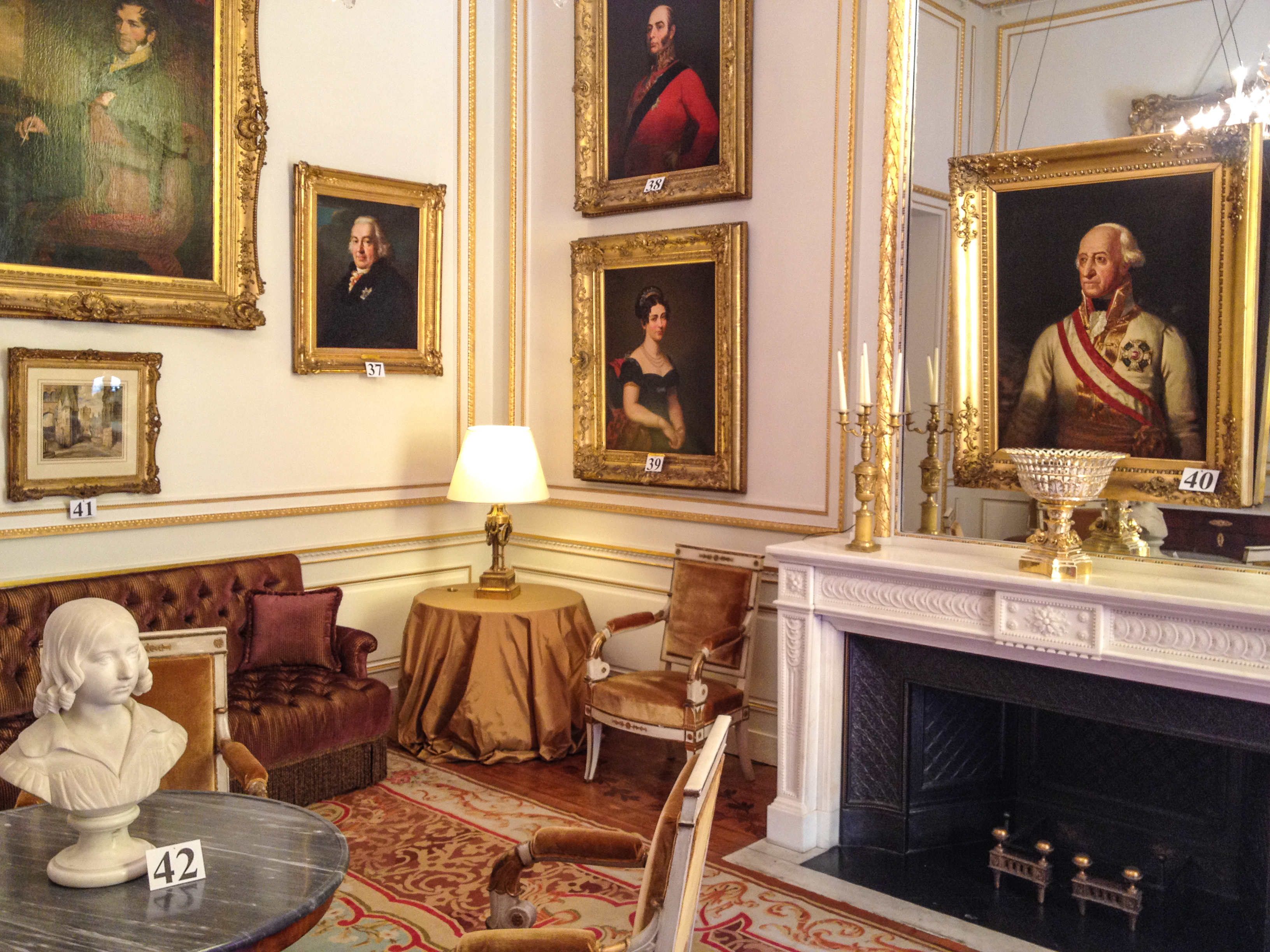 The Royal Palace of Brussels (Dutch: Koninklijk Paleis van Brussel